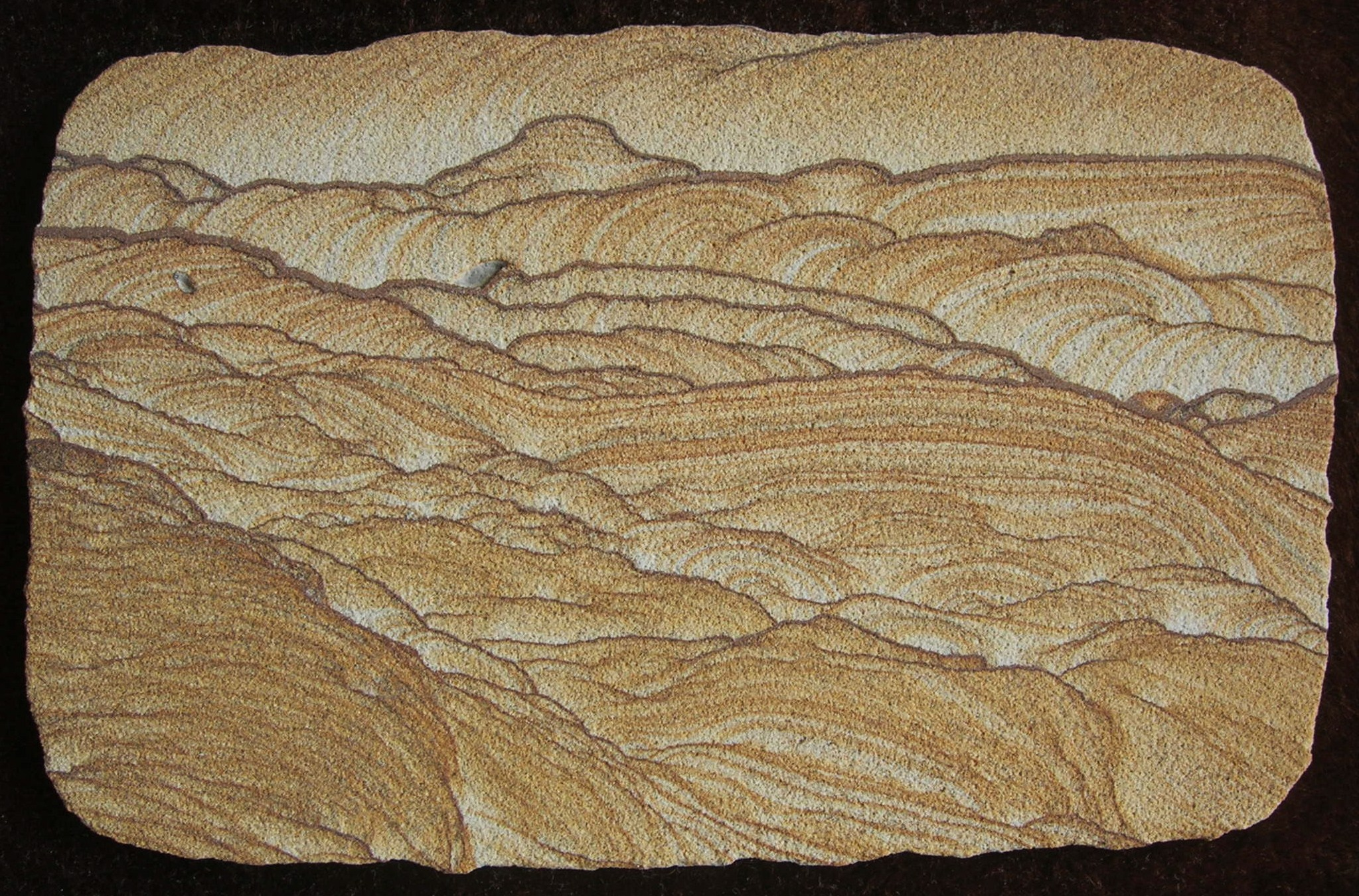 Pierre à images, Kanab, Utah, Etats-Unis